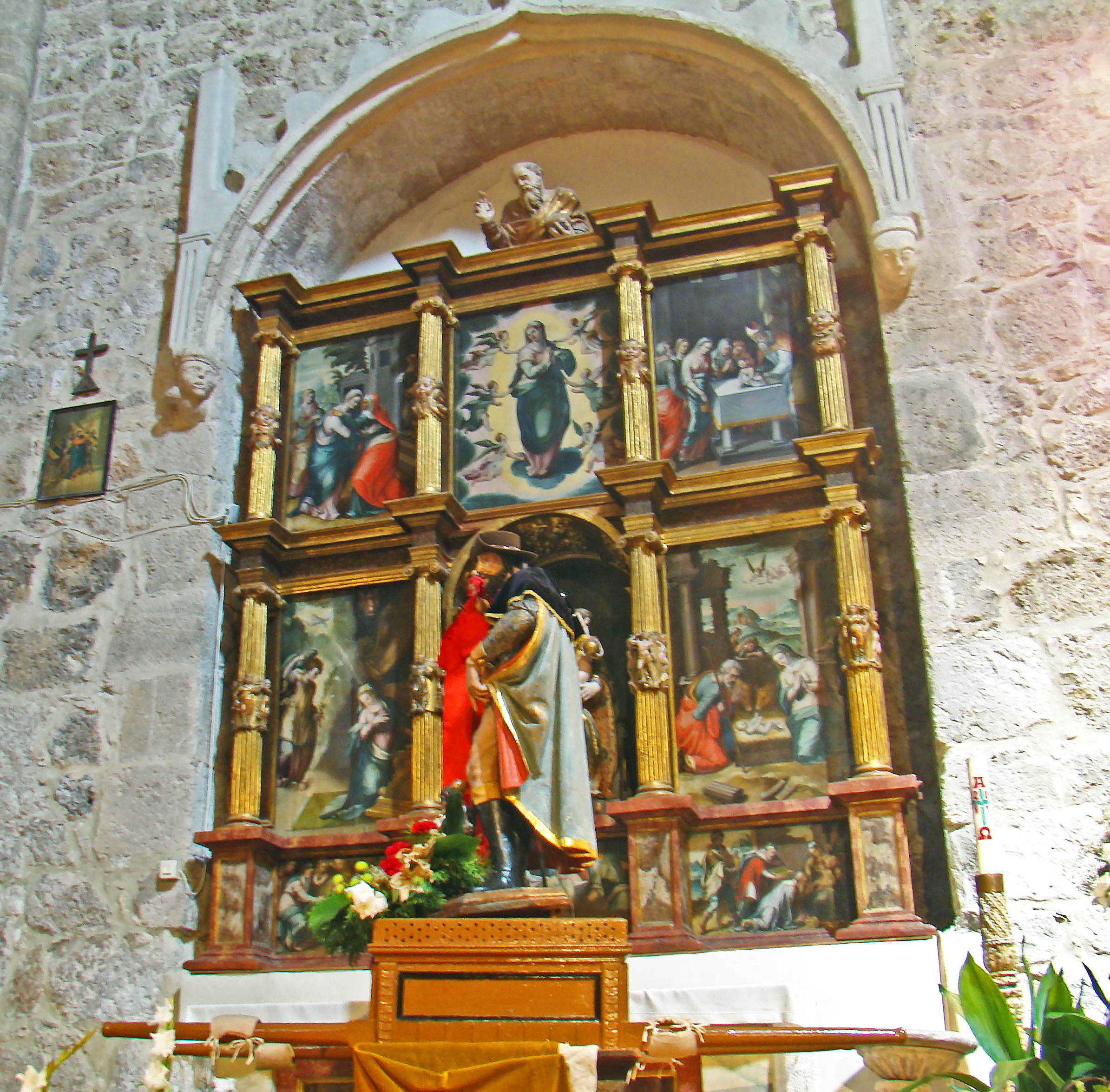 Aldeamayor de San Martín (Valladolid, España). Retablo de Nuestra Señora de la iglesia de San Martín de Tours.